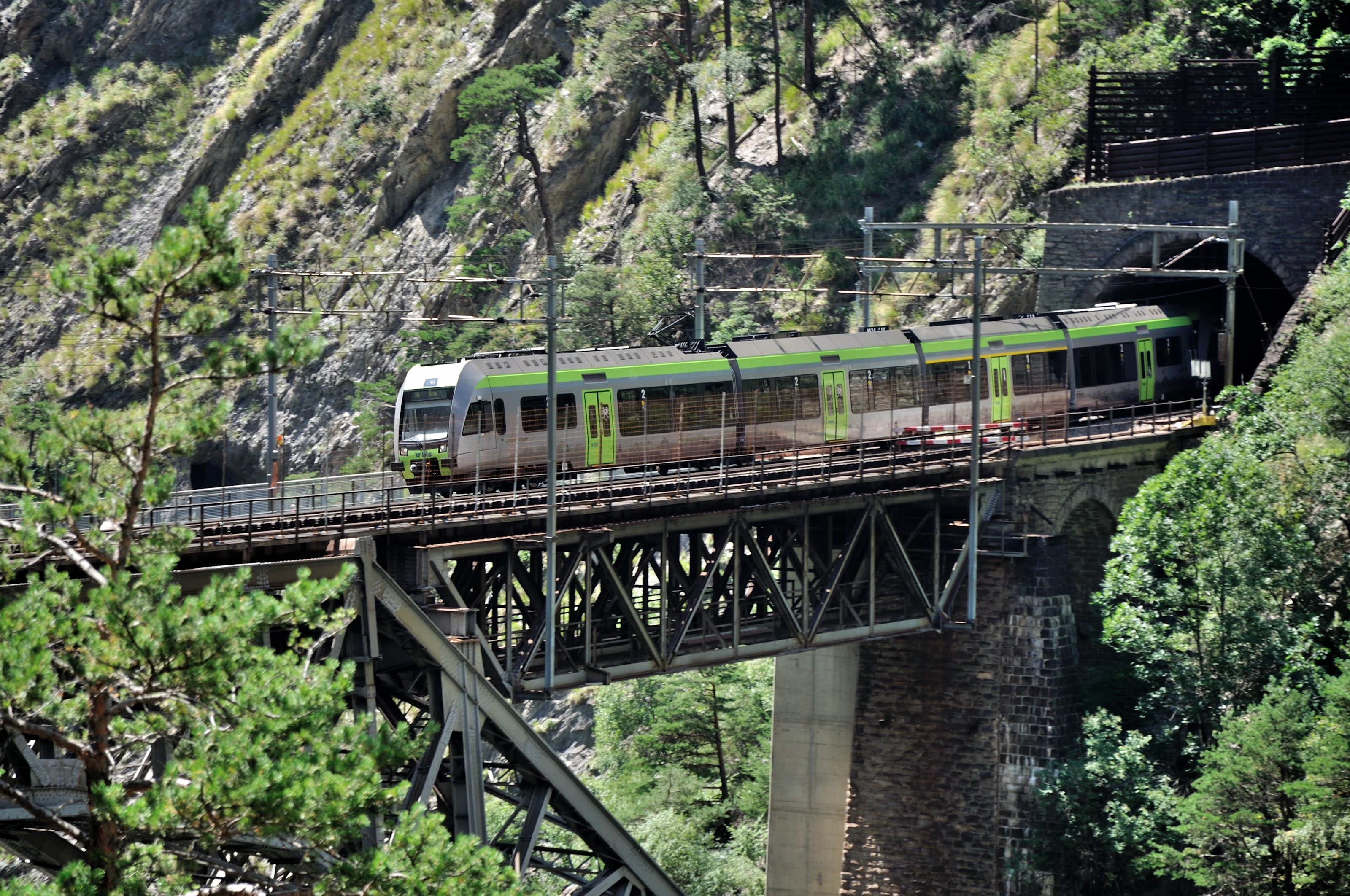 Switzerland, Valais, hike on Lötschberg Südrampe